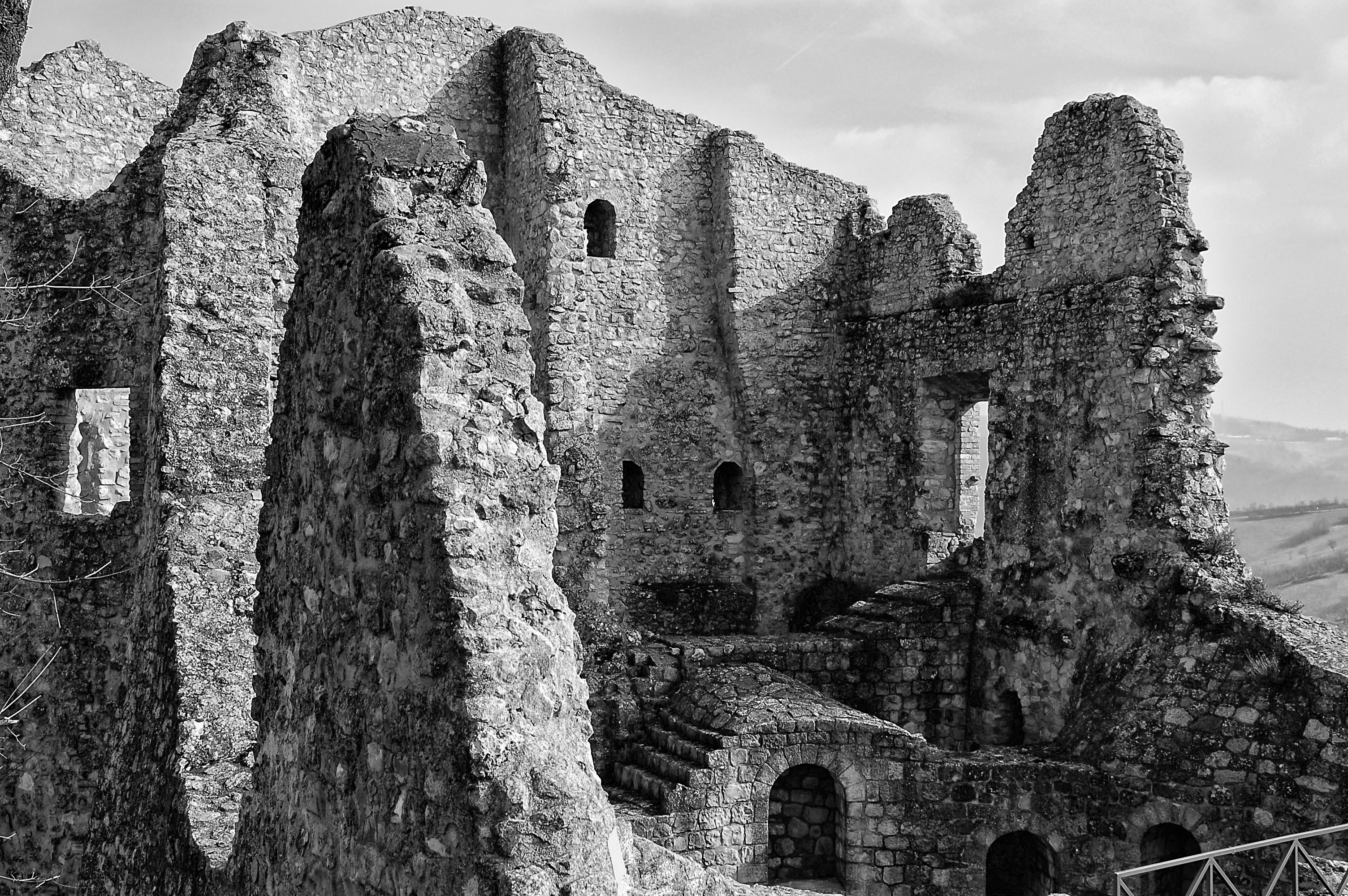 Castello di Canossa This is a photo of a monument which is part of cultural heritage of Italy.